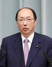 中文（中国大陆）: 日本环境大臣中川雅治